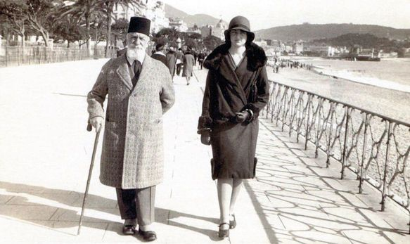 Halife Abdülmecid Efendi ve kızı Dürrüşehvar Sultan, Nice'in meşhur sahili “Promenade des Anglais”de sabah yürüyüşünde.